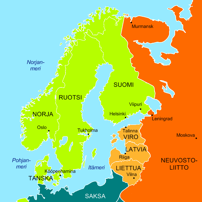 Pohjoinen Eurooppan marraskuussa 1939. Puolueettomat maat Saksa ja sen miehittämät maat Neuvostoliitto ja sen miehittämät maat Neuvostoliiton sotilastukikohtia